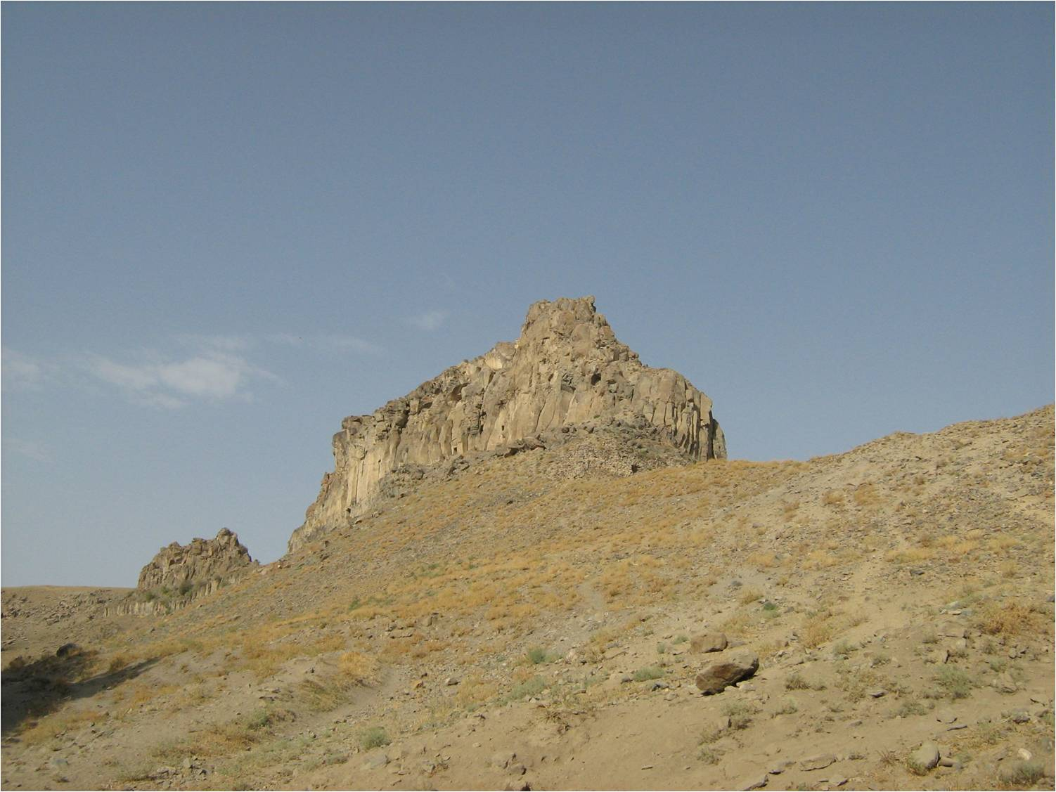 מצודת צ'הריק אשר נמצאת במחוז אורמיה בצפון מזרח איראן